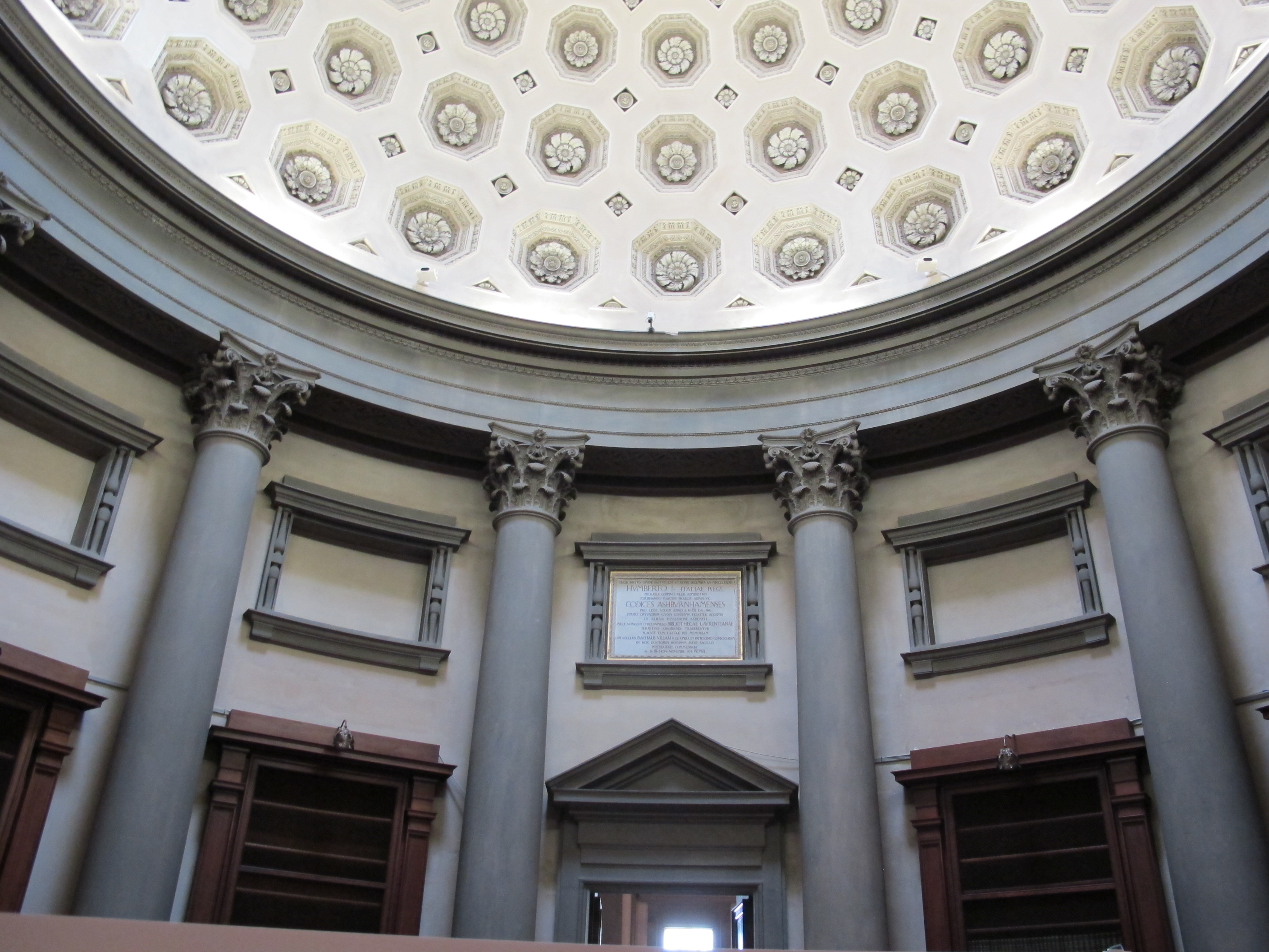 Biblioteca laurenziana, rotonda